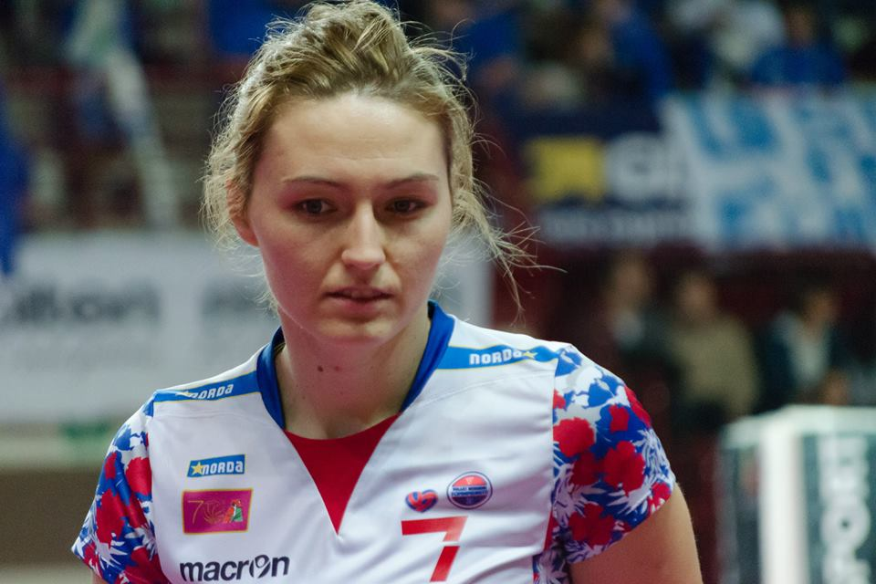 Pallavolista serba, gioca nel ruolo di schiacciatrice